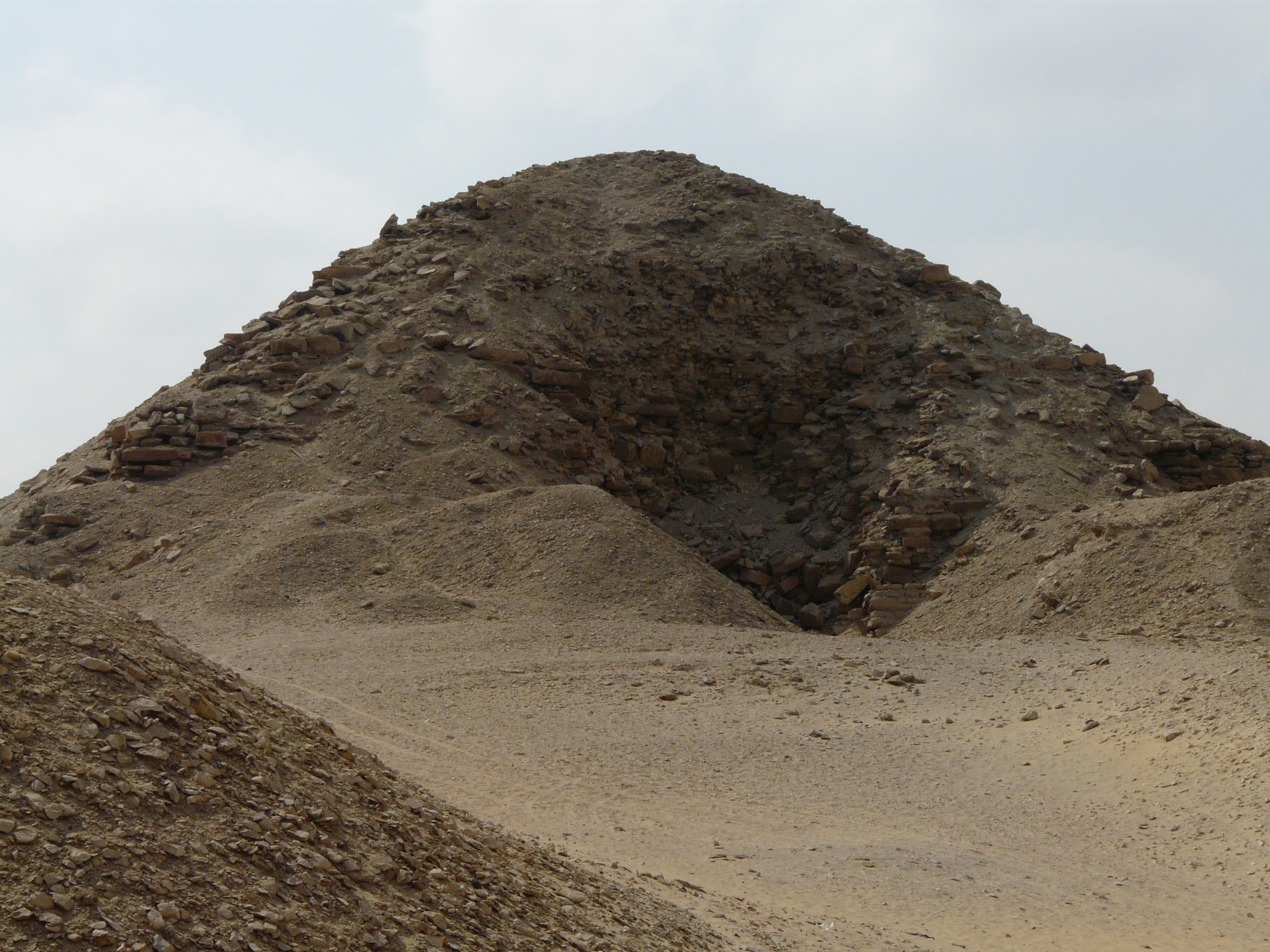 Façade nord de la pyramide de Niouserrê (Ve dynastie) - Site d'Abousir